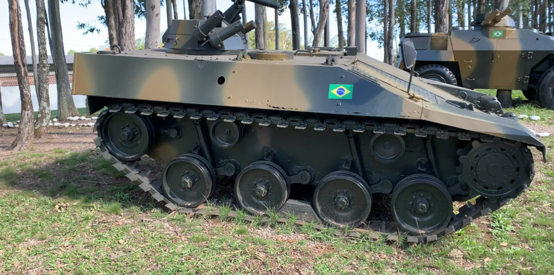 Foto extraída de um vídeo produzido no museu ao ar livre do Centro de Instrução de Blindados do Exército Brasileiro)